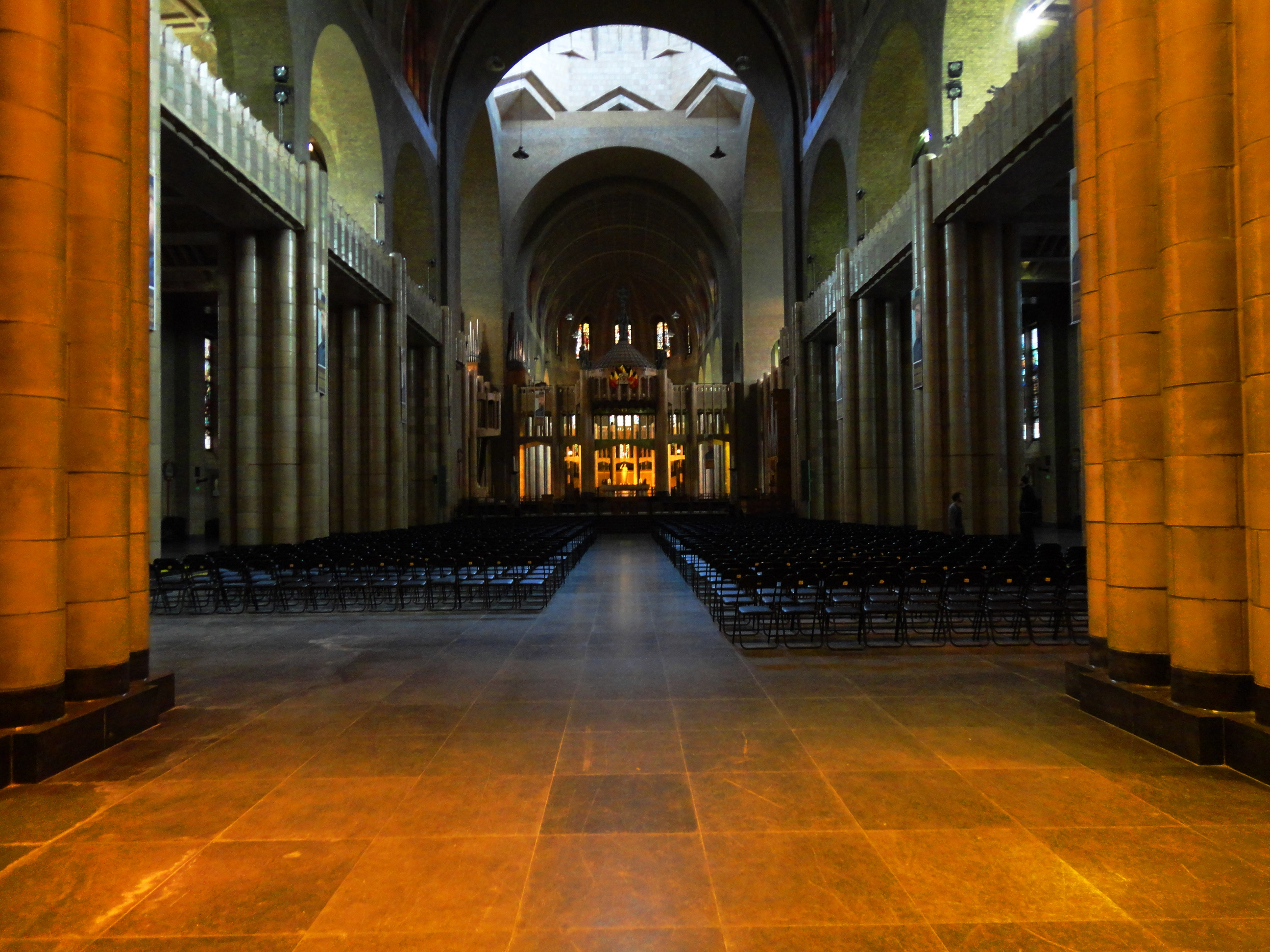 Nef de la Basilique du Sacré-Cœur de Bruxelles. Photo prise depuis l'entrée, on voit l'intérieur de l'église dans toute sa longueur.